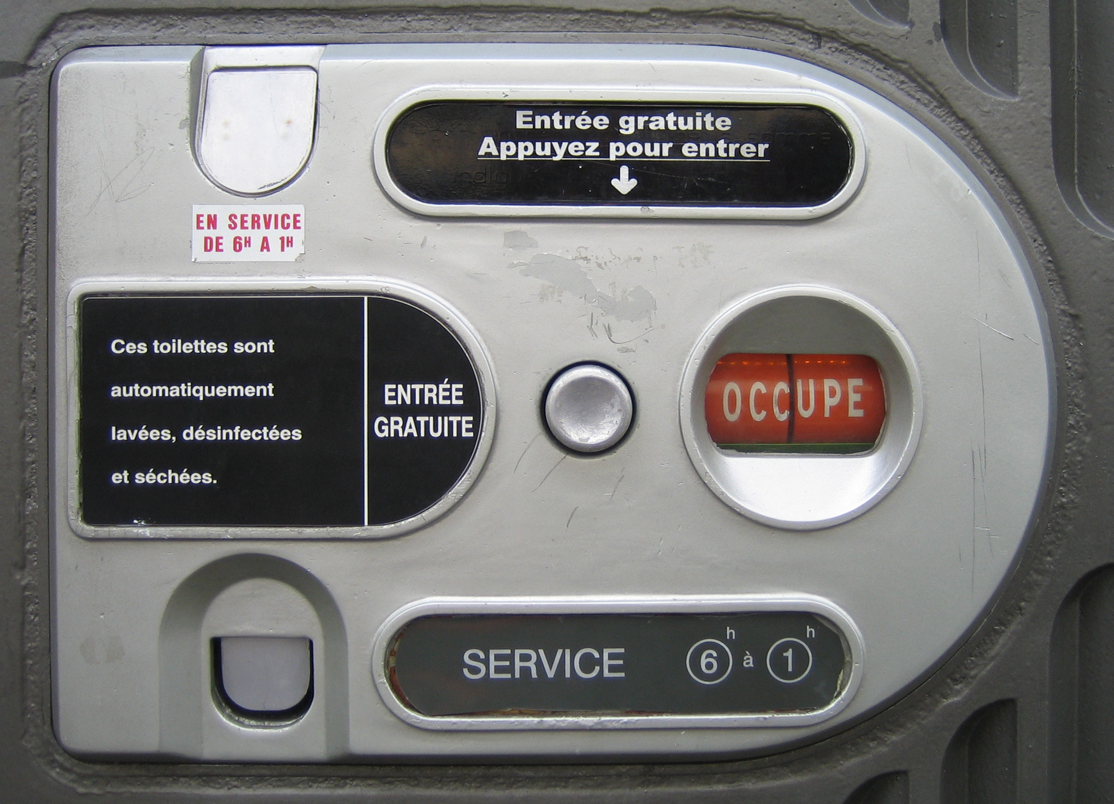 Sanisette in Paris.